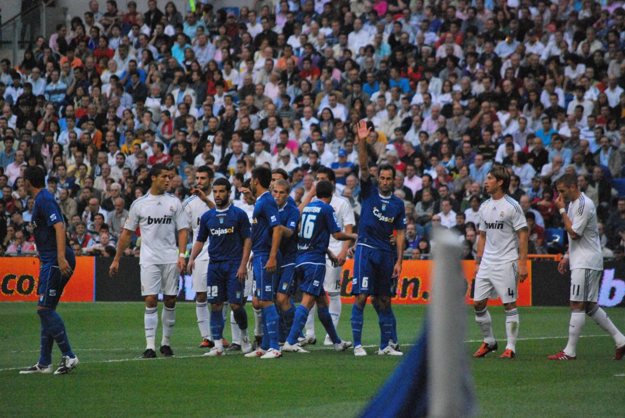 Real Madrid 5 - Xerez 0 20/9/09